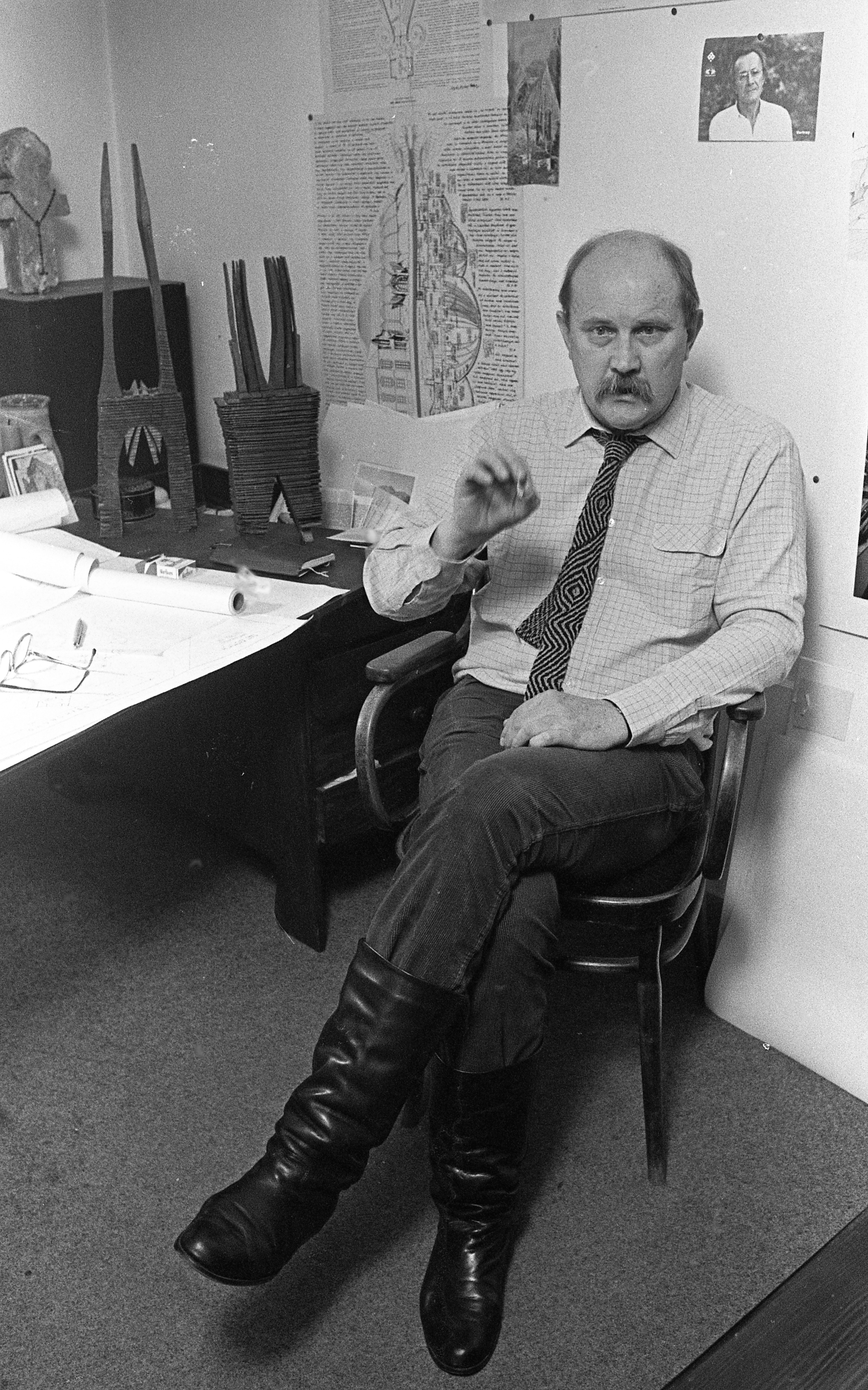 Makovecz Imre magyar építész, a magyar organikus építészet megteremtője